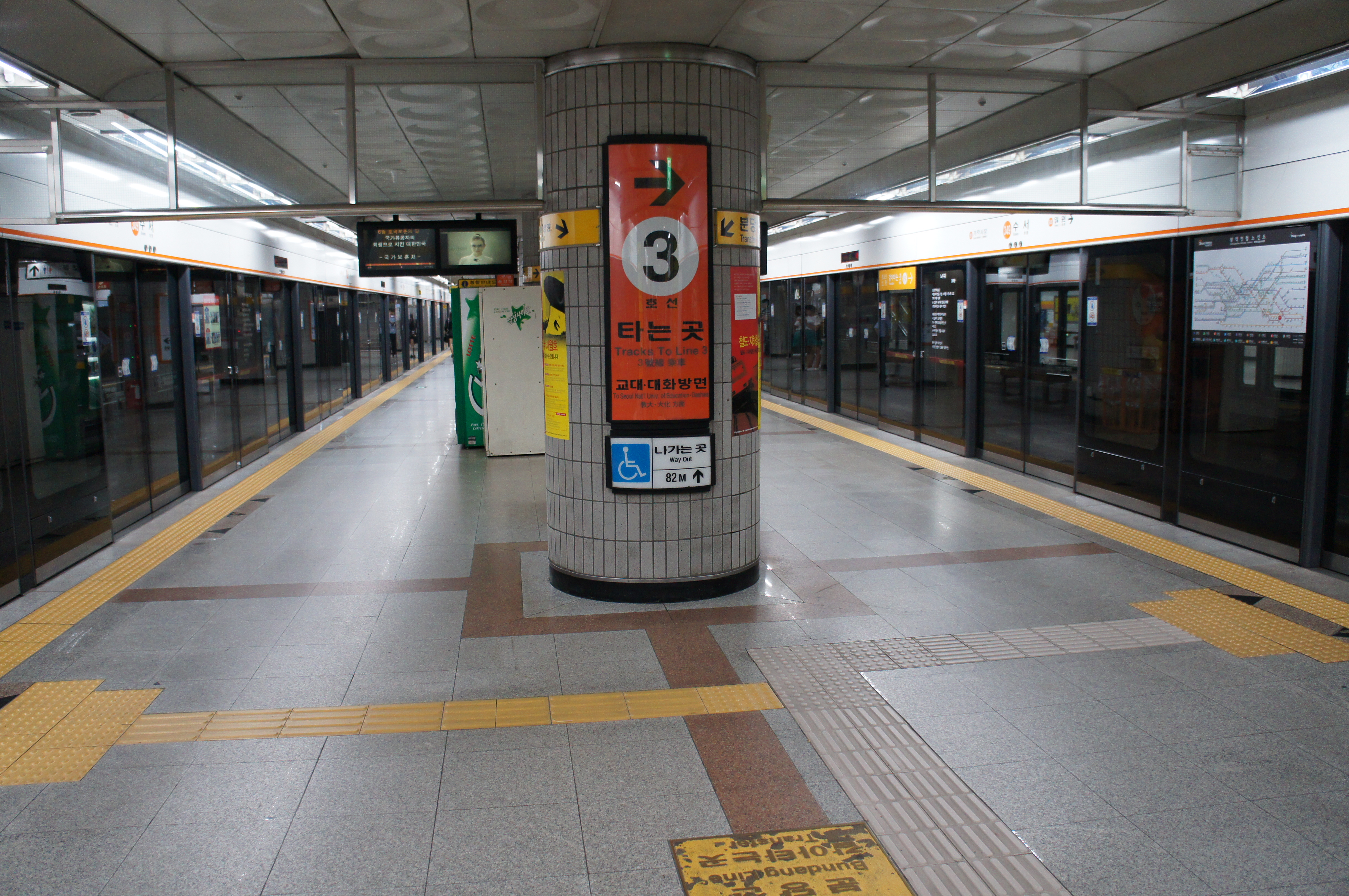 수서역 2,3번 승강장